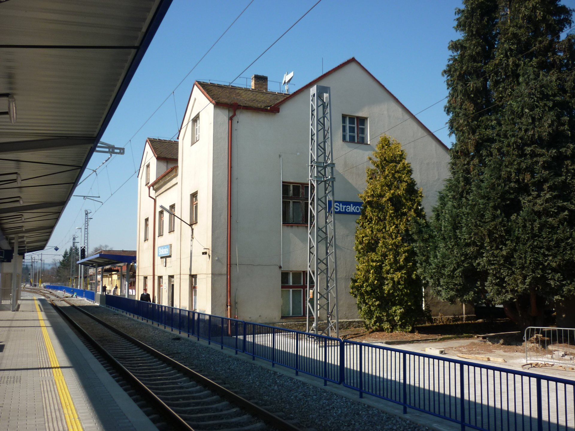 Strakonice - železniční stanice